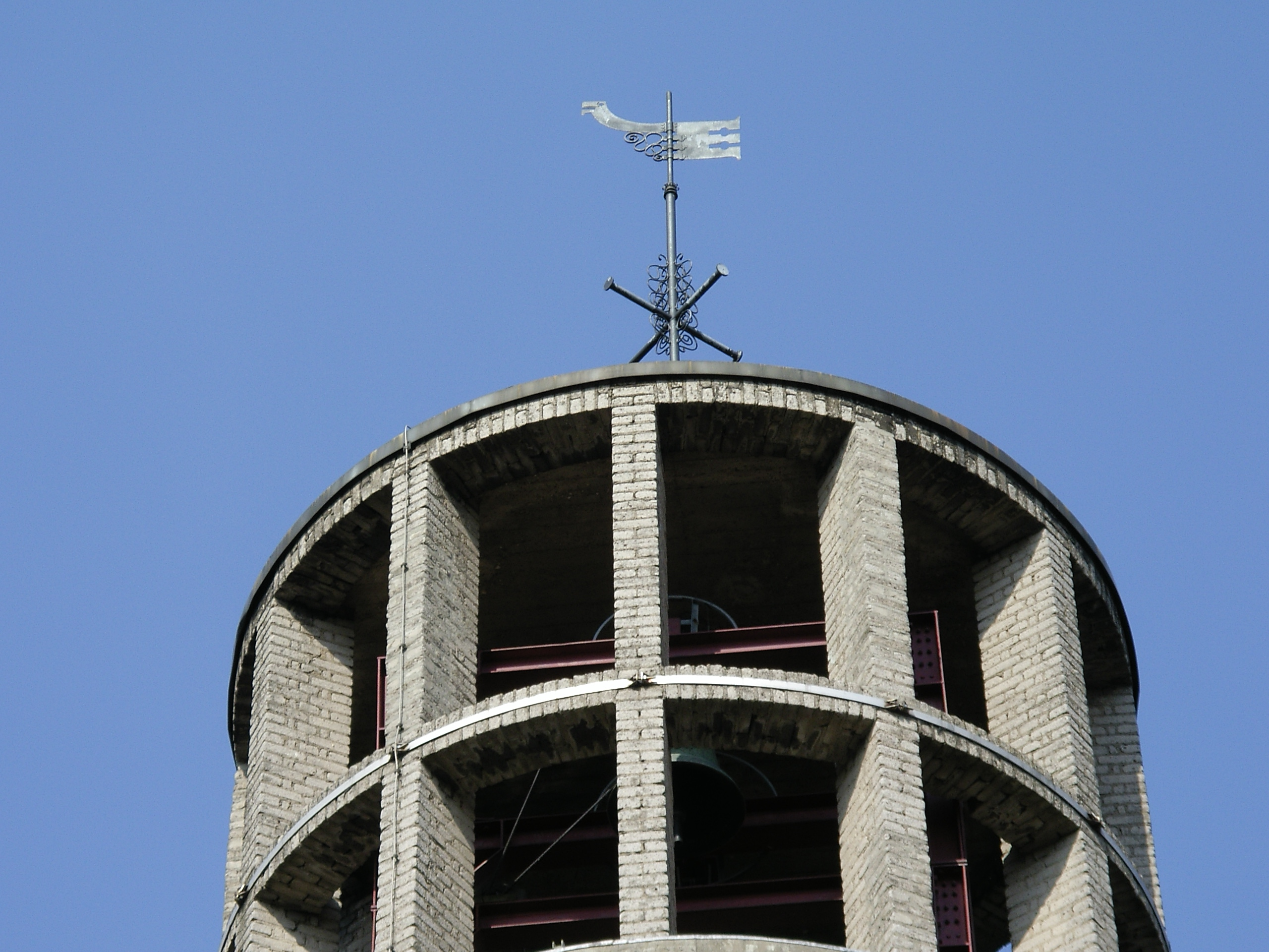 Düsseldorf-Heerdt - Bunkerkirche am Handweiser - Turmspitze